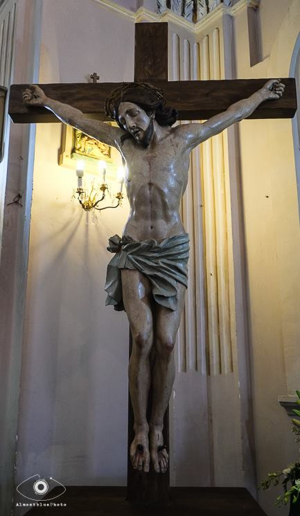 Crocifisso di Soverato dopo il restauro